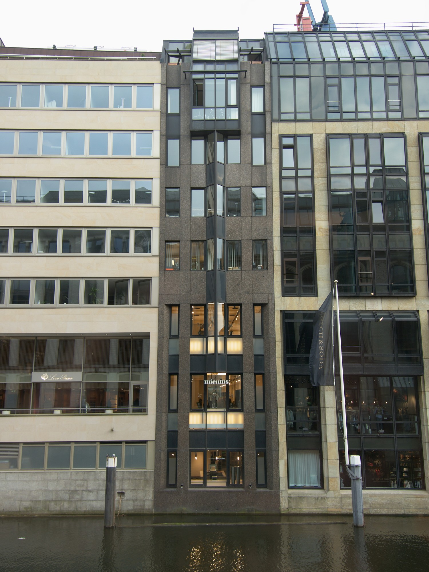 Haus Mientus Neuer Wall (Architekt: Graaf, Schwager & Partner 1980)